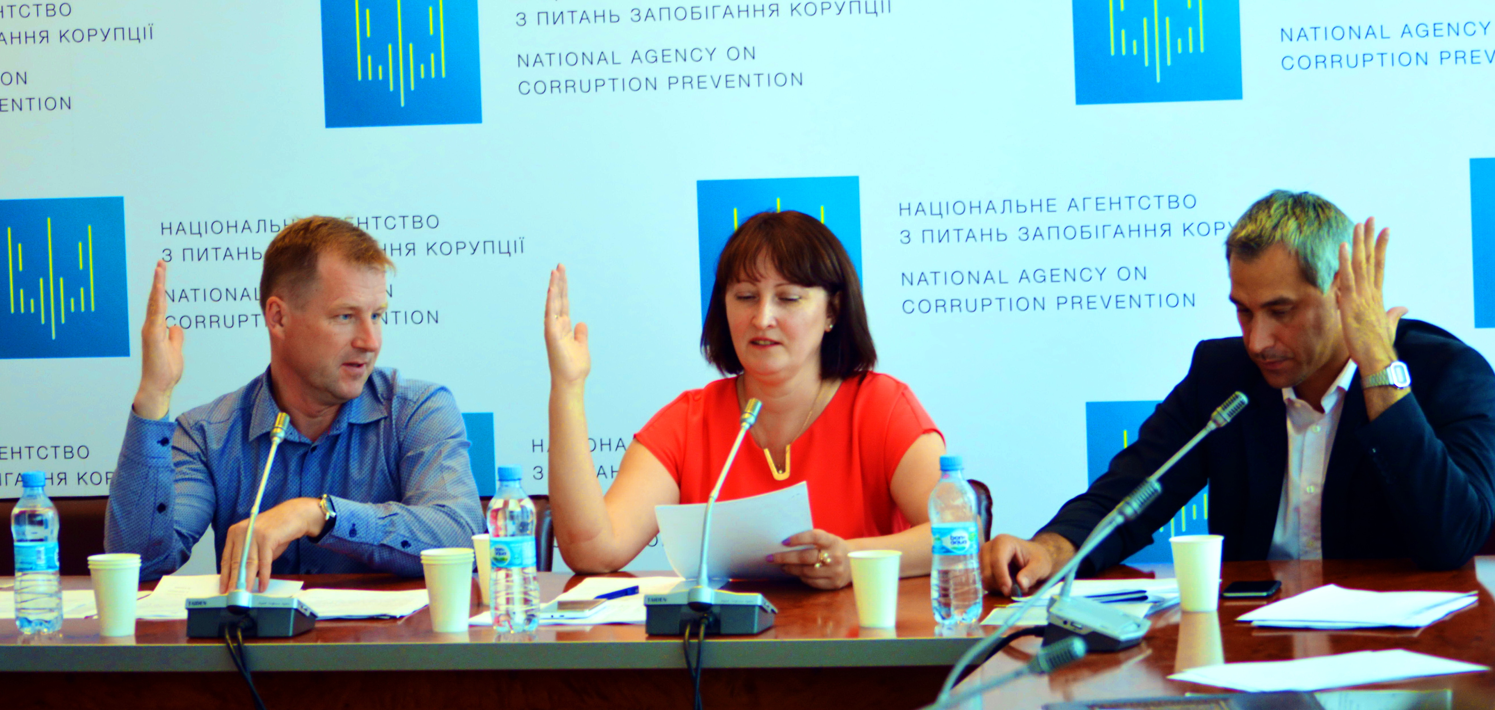 Фото. вересень 2016